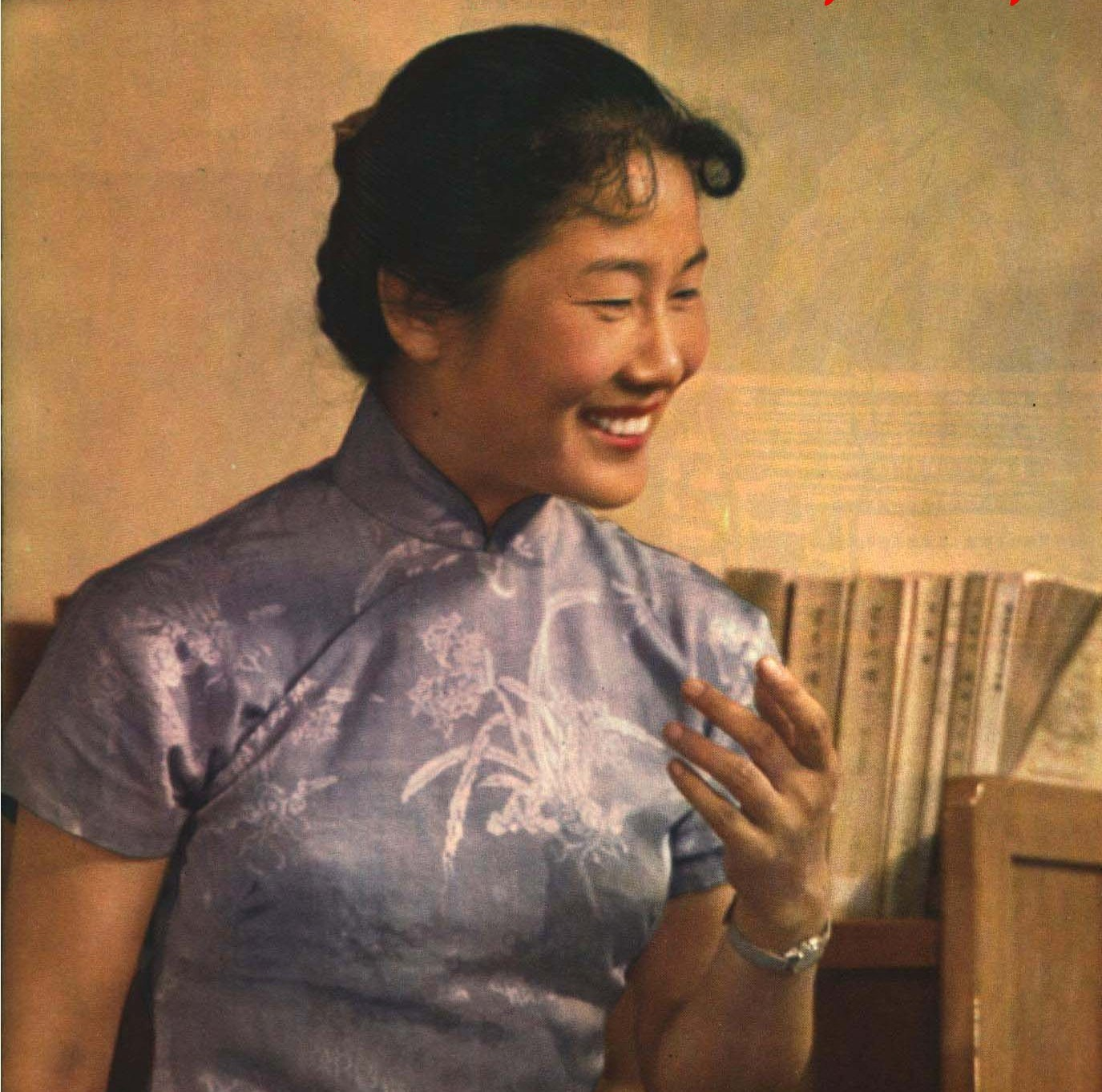 1963-10 1963年 张瑞芳